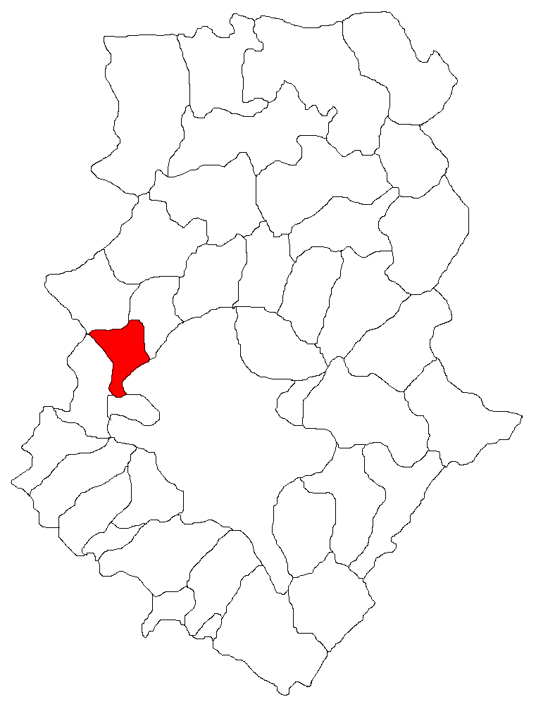 Categorie:Hărţi ale judeţului Ilfov